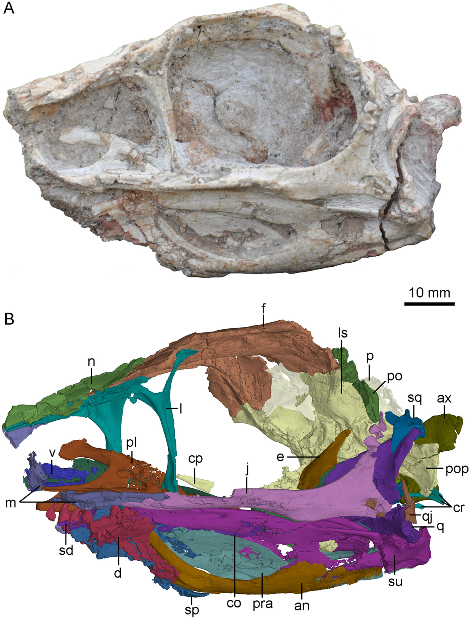 Skull and mandibles of Sinovenator PMOL-AD00102 in left lateral view. (A) photograph; (B) CT-rendered image. Study sites: an, angular; ax, axis; co, coronoid; cp, cultriform process; cr, cervical ribs; d, dentary; e, epipterygoid; f, frontal; j, jugal; l, lacrimal; ls, laterosphenoid; m, maxilla; n, nasal; p, parietal; pl, palatine; po, postorbital; pop, paroccipital process; pra, prearticular; q, quadrate; qj, quadratojugal; sd, supradentary; sp, splenial; sq, squamosal; su, surangular; v, vomer.